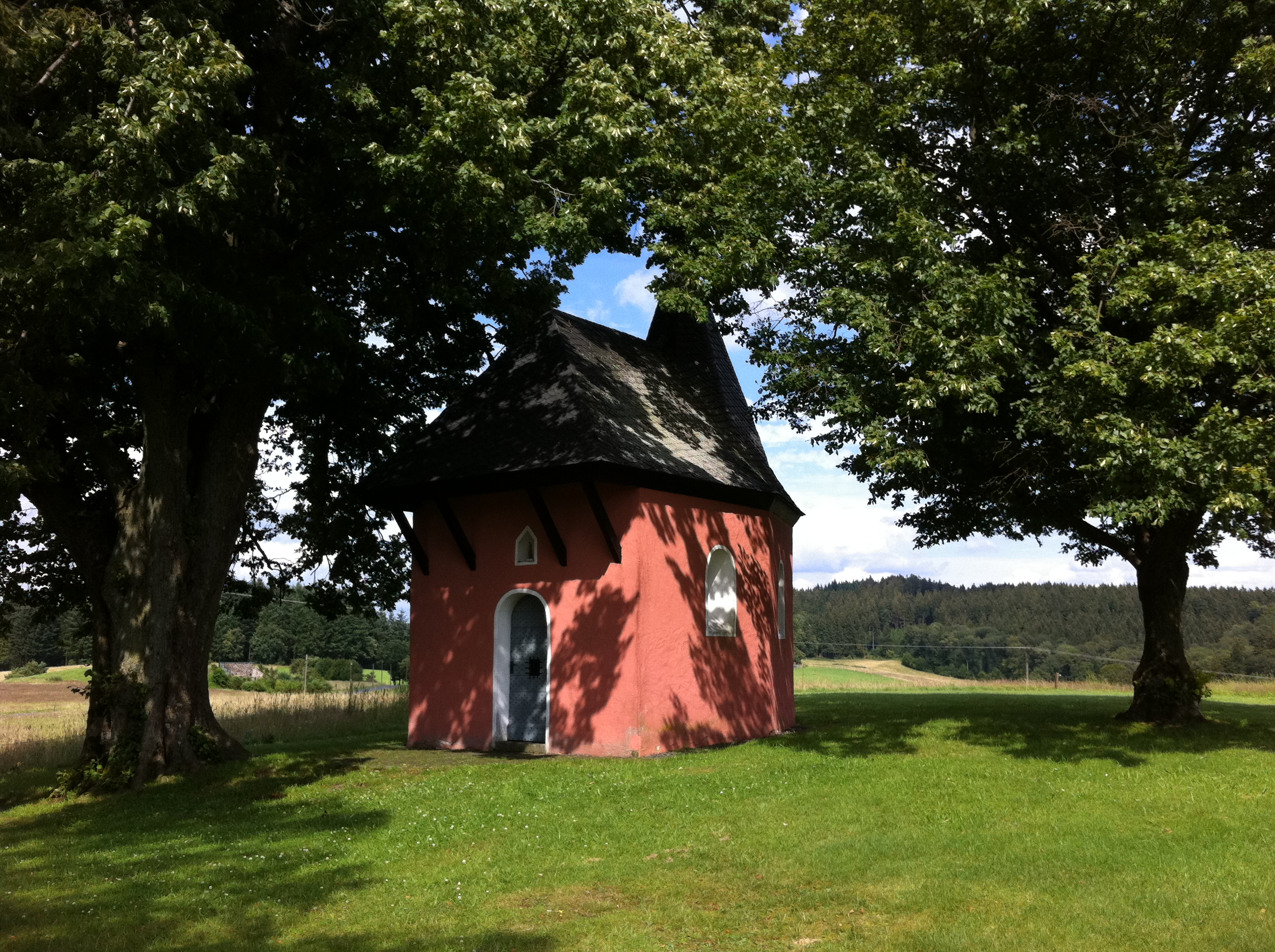 Sankt Anna Kapelle, Friesenhagen, Sommer 2012